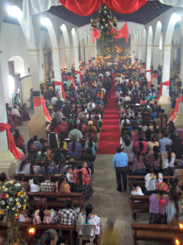 Así luce el templo de San Cristóbal Mártir cada 25 de Julio en conmemoración de su día.